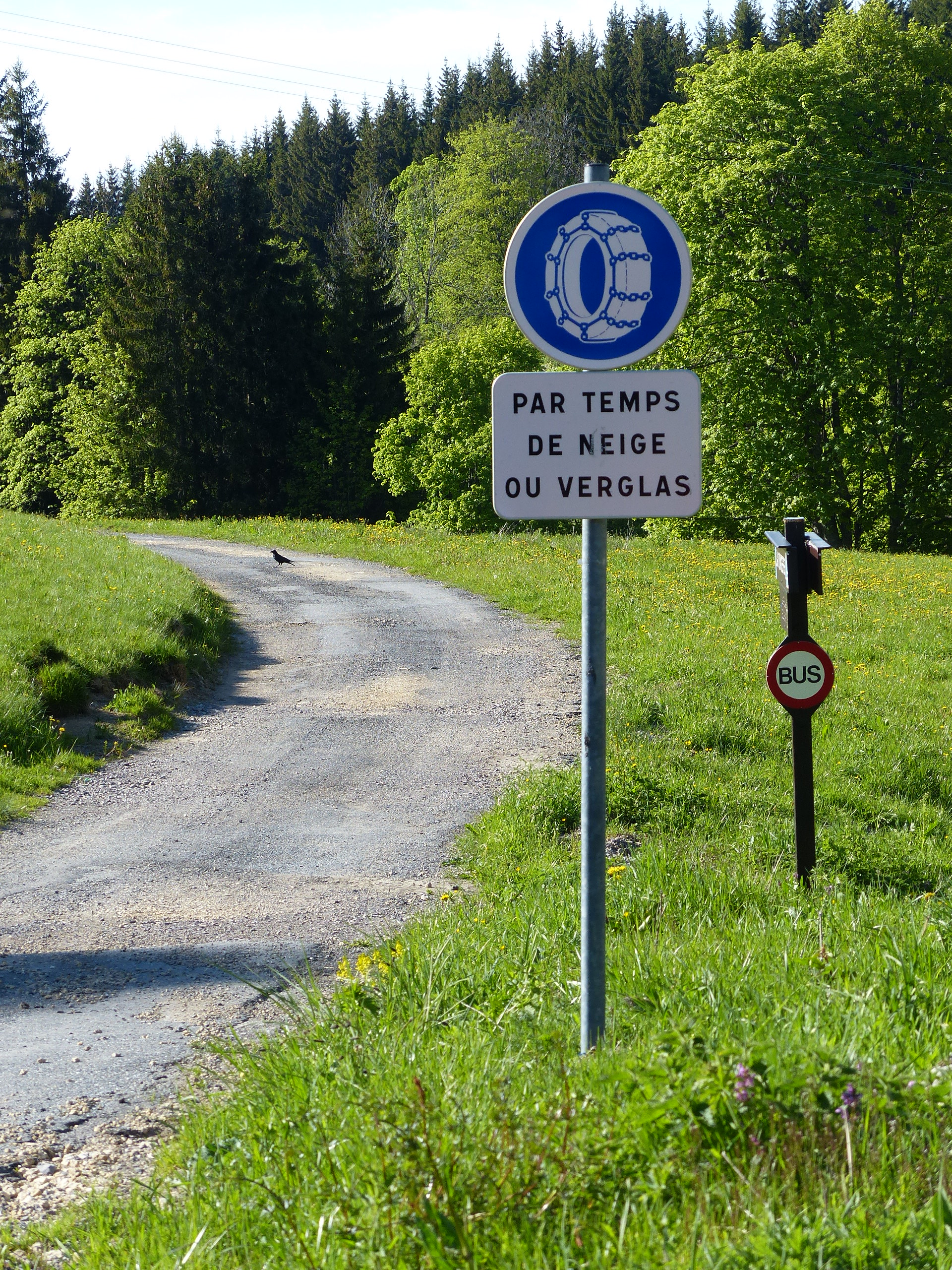 Panneaux de signalisation routière française, B26, M9z Mai 2016